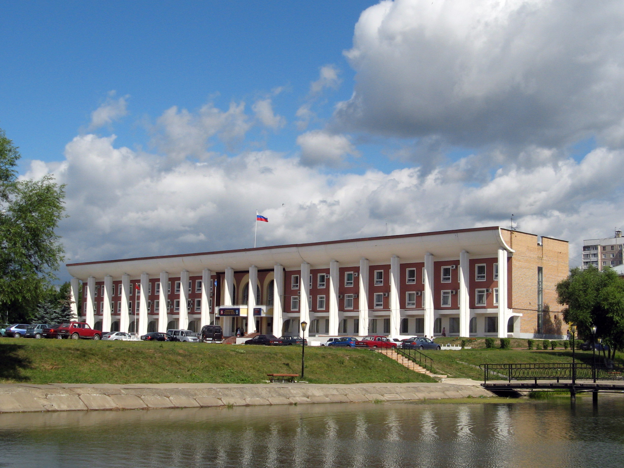 здание районной администрации в г. Чехов (Московская область)